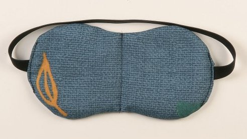 Mit Weizenkörnern gefüllte, aufheizbare Schlafmaske (Körnerbrille ?)